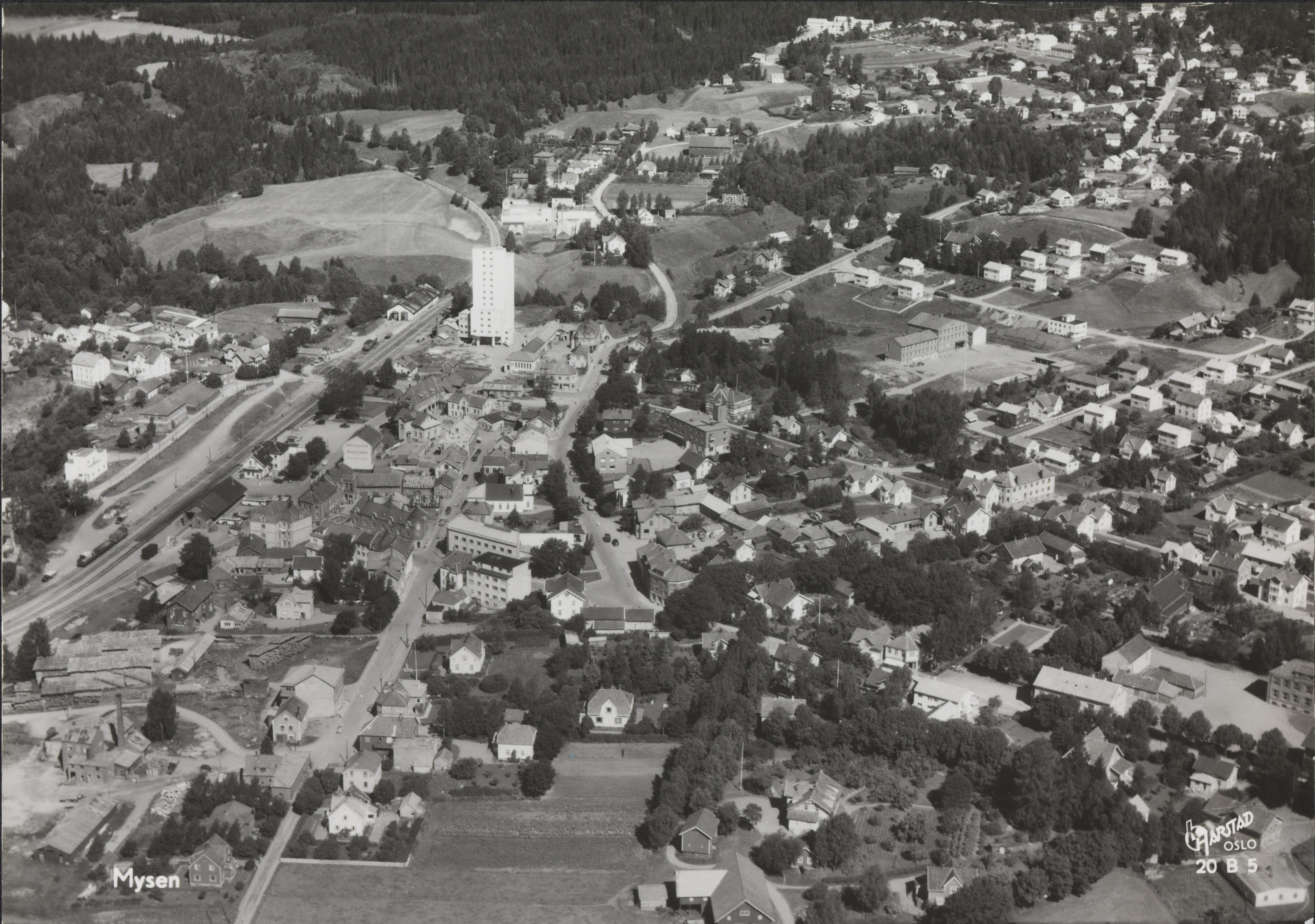 Mysen, luftfoto. Mysen stasjon til venstre, kornsiloen er den høye lyse bygningen i midten, til høyre for den ligger nåværende Mysen videregående skole